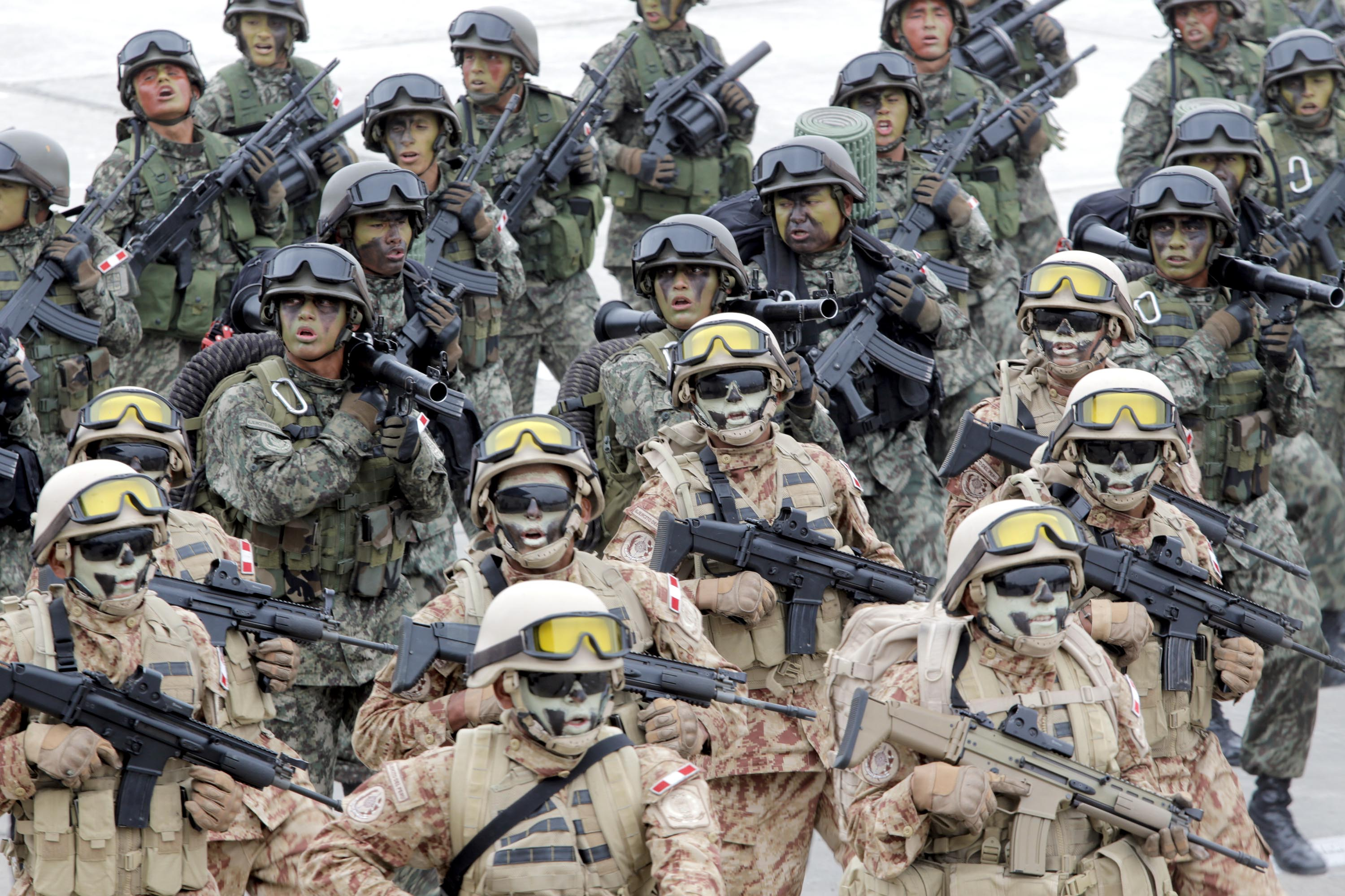 El ministro de Defensa, Pedro Cateriano Bellido, acompañó al Presidente del Consejo de Ministros, César Villanueva, en la ceremonia por el Día del Soldado, en el Cuartel General del Ejército